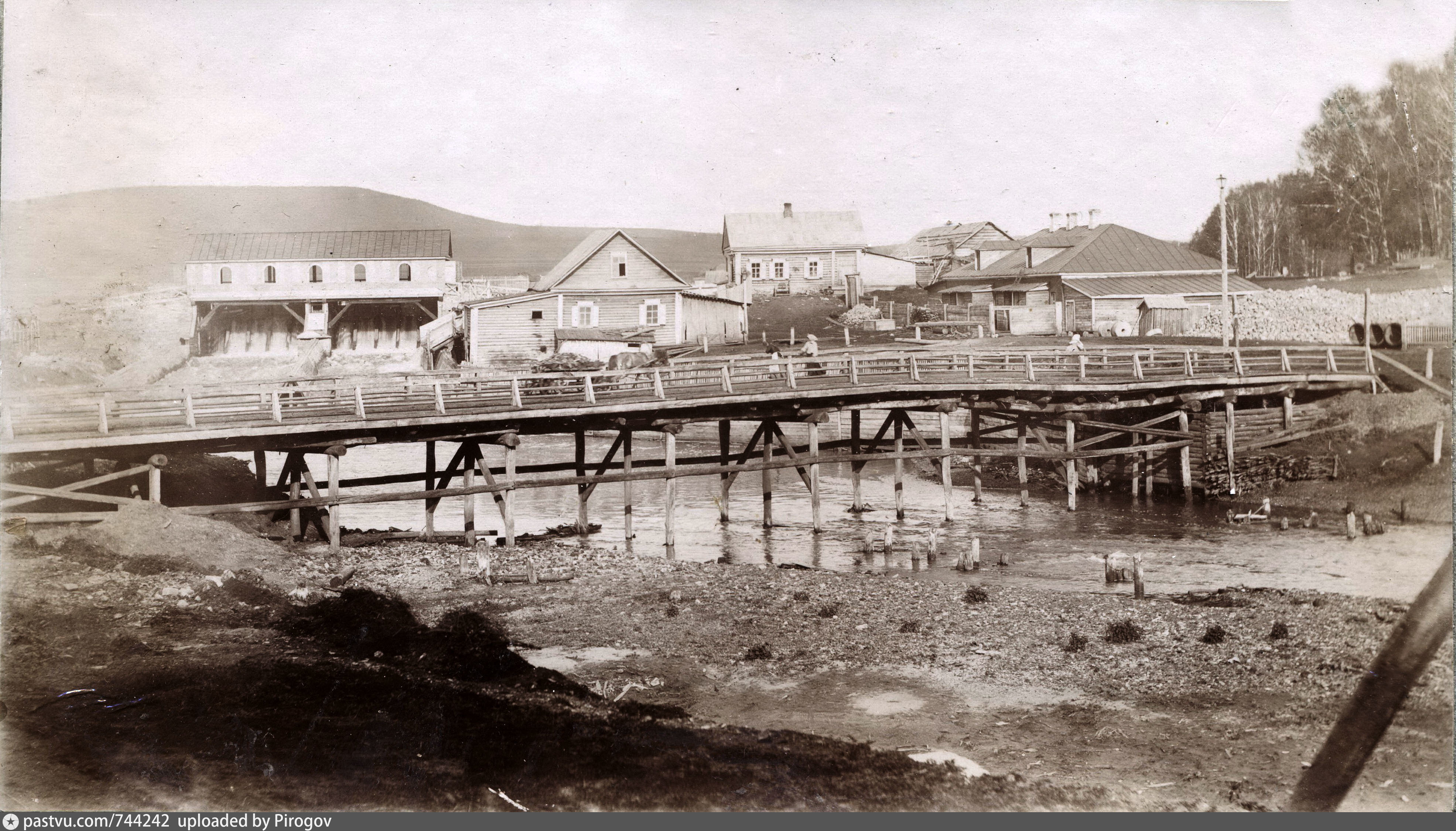 Богоявленский завод Стерлитамакского уезда Уфимской губернии. Заводской мост 1900 – 1910, Россия, Башкортостан